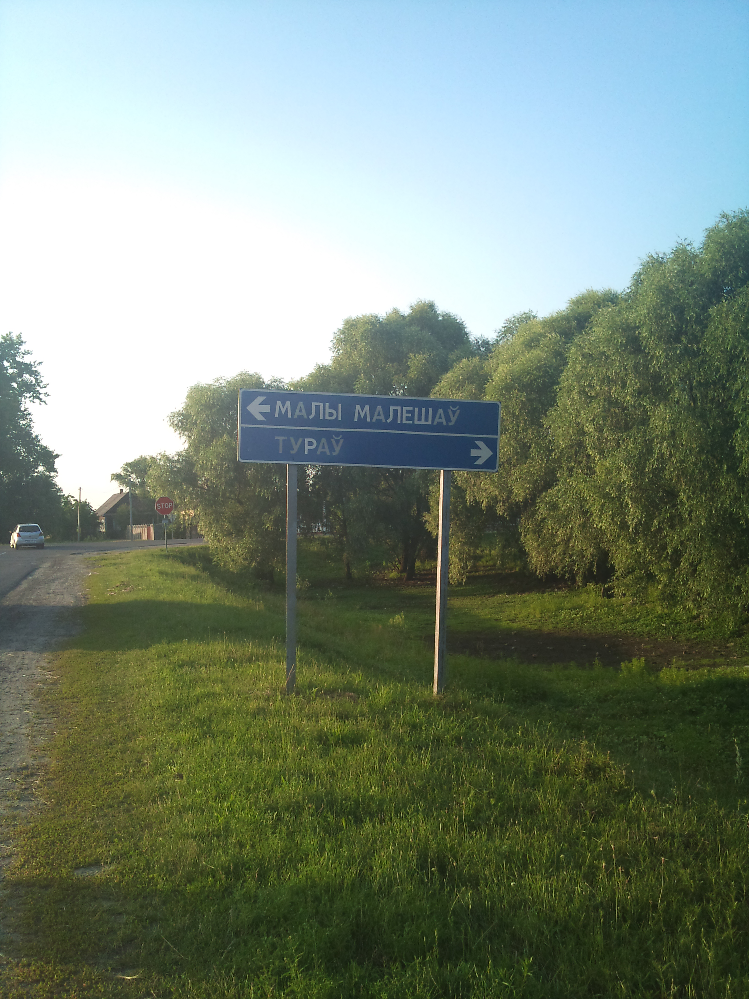 Беларуская (тарашкевіца): Дарожны знак у вёсцы Верасьніца